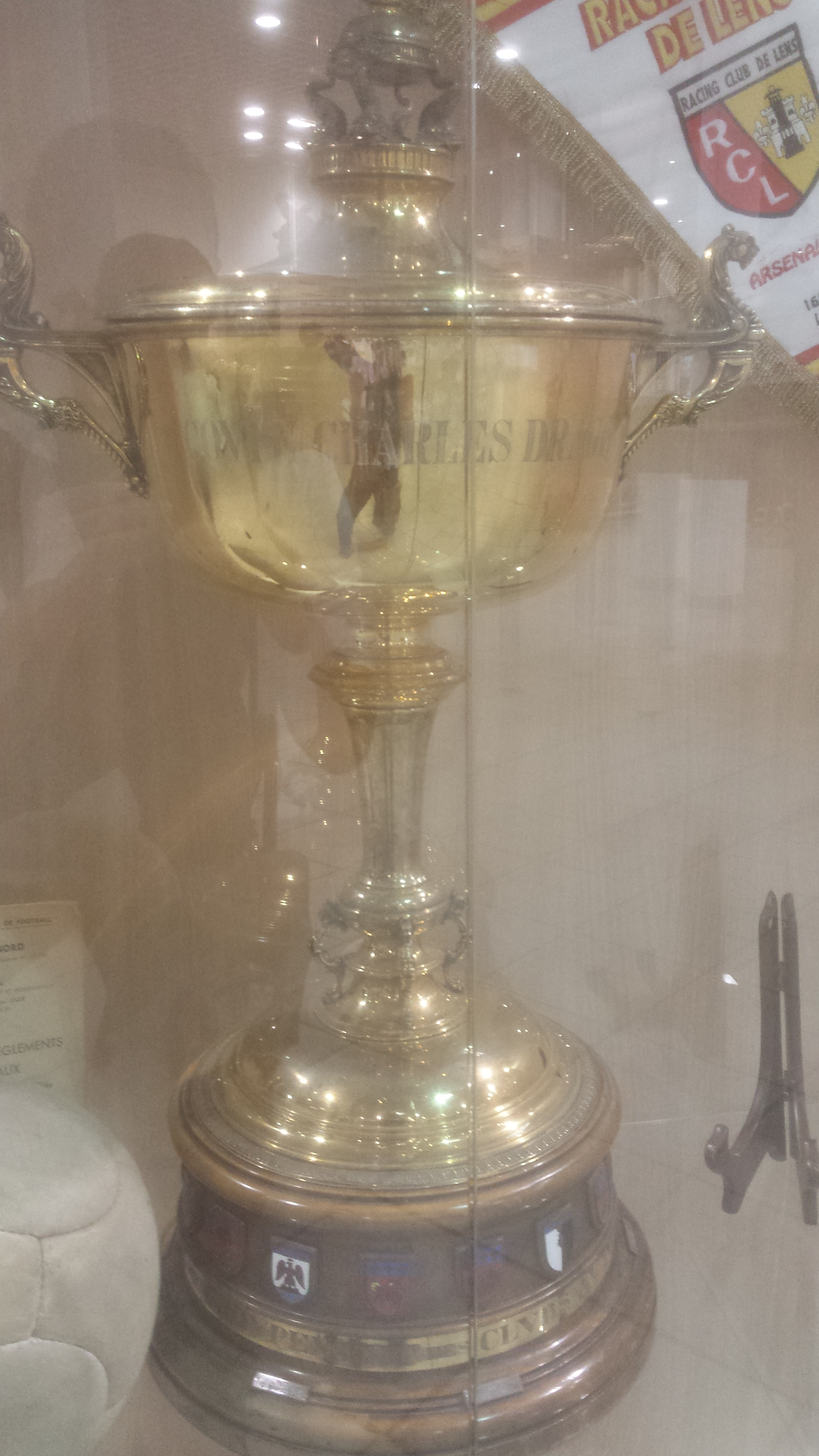 Coupe Charles Drago exposé à la boutique Emotion Foot de Lens, en mai 2015.